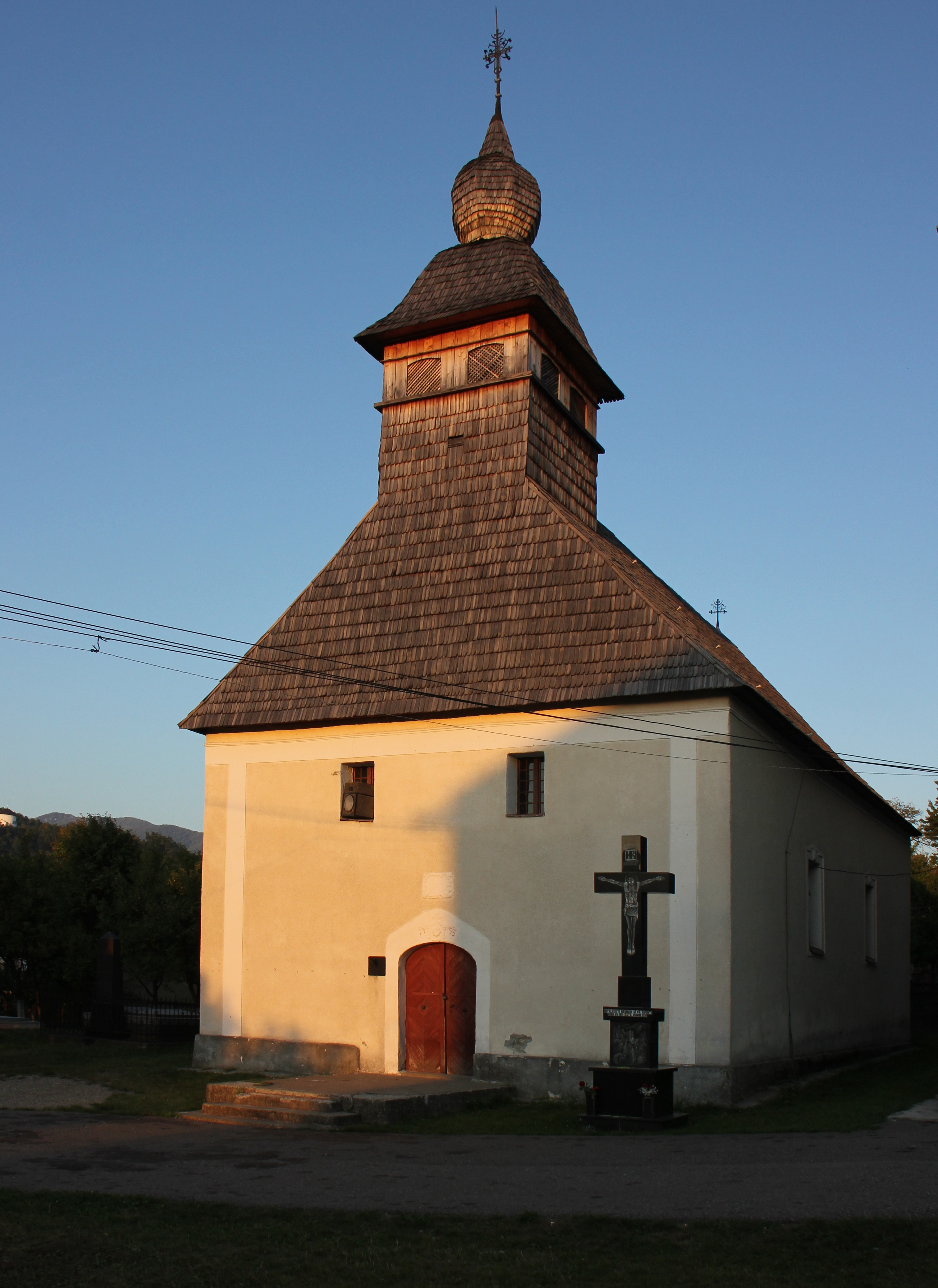 Biserica "Adormirea Maicii Domnului", oraș Baia Sprie, Str. Horea 7, 1793